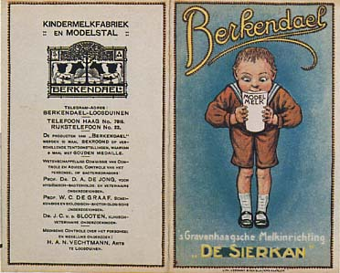 Poster van De Sierkan, melkfabriek uit Den Haag